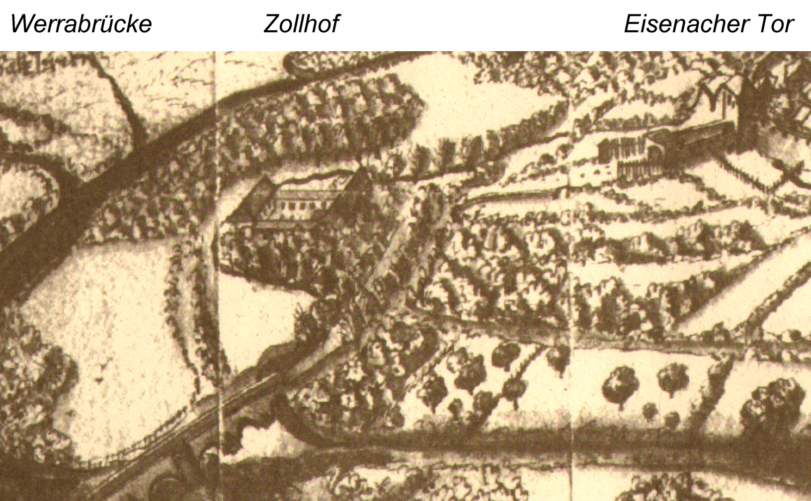 Ausschnitt der Stadtansicht Creuzburg von Johann Georg Busch aus dem Jahr 1717.